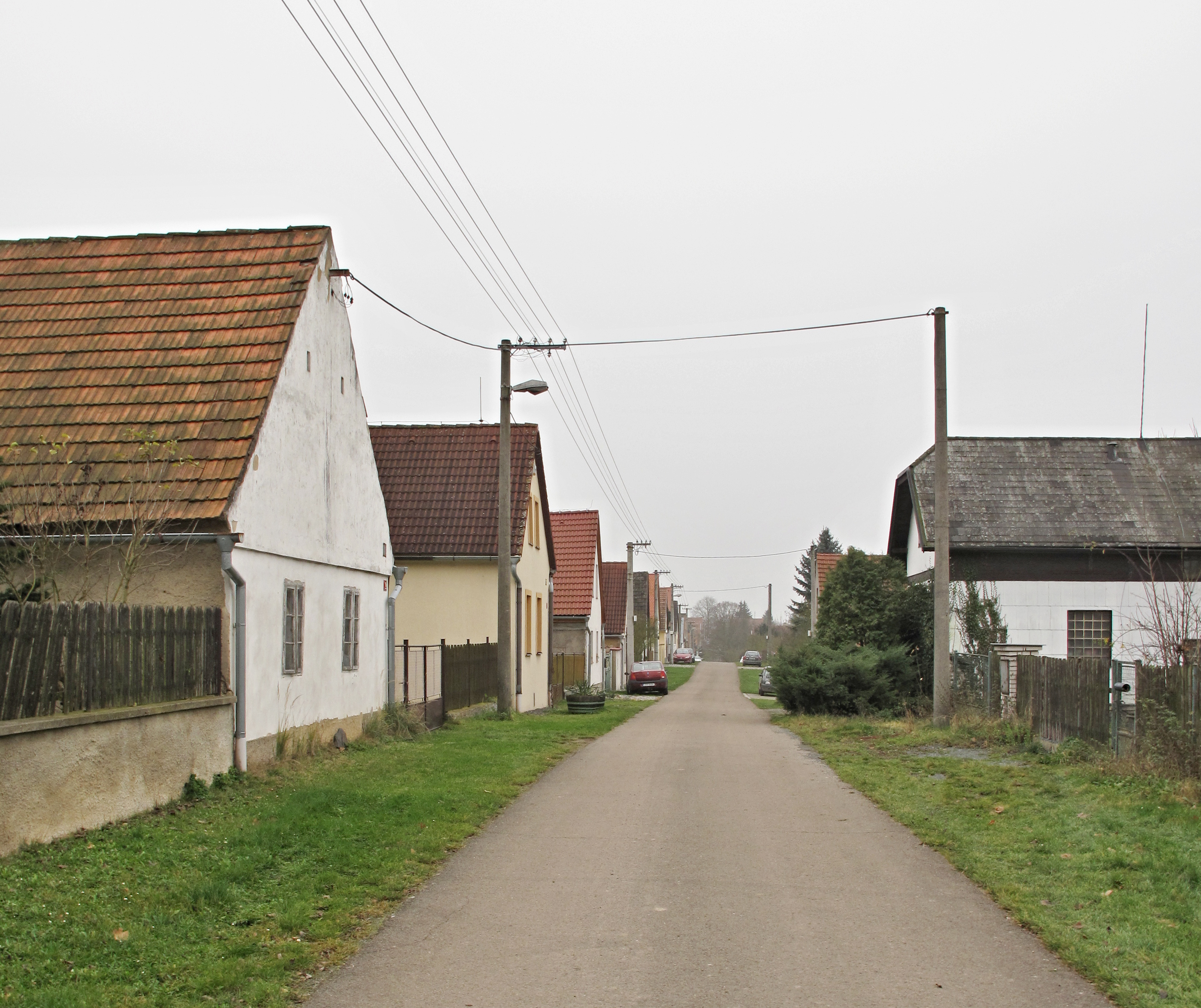 Silnice v Novém Domě. Okres Rakovník, Česká republika.